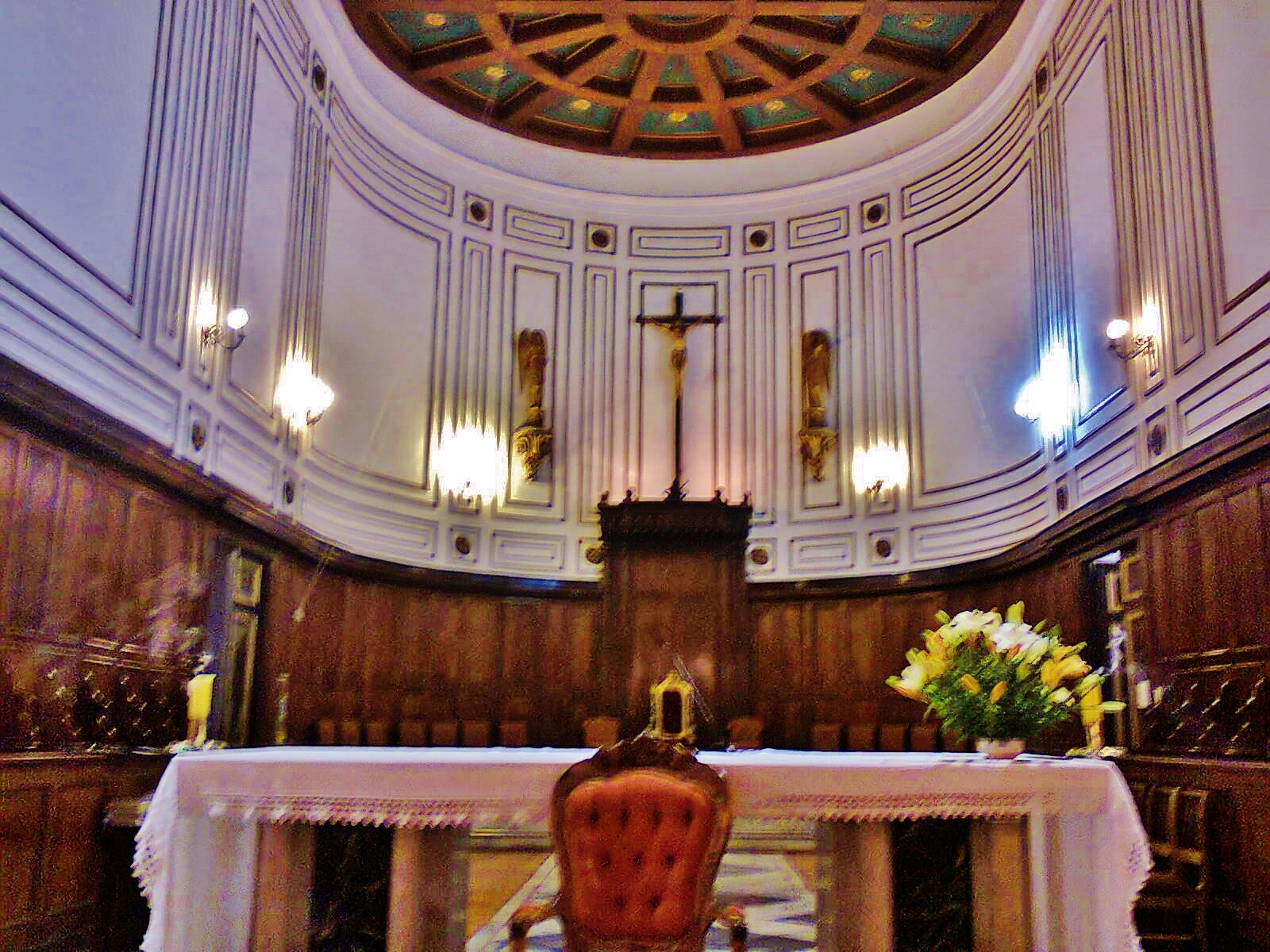 Altar y cátedra - Iglesia Catedral de San Felipe de Aconcagua, Chile.